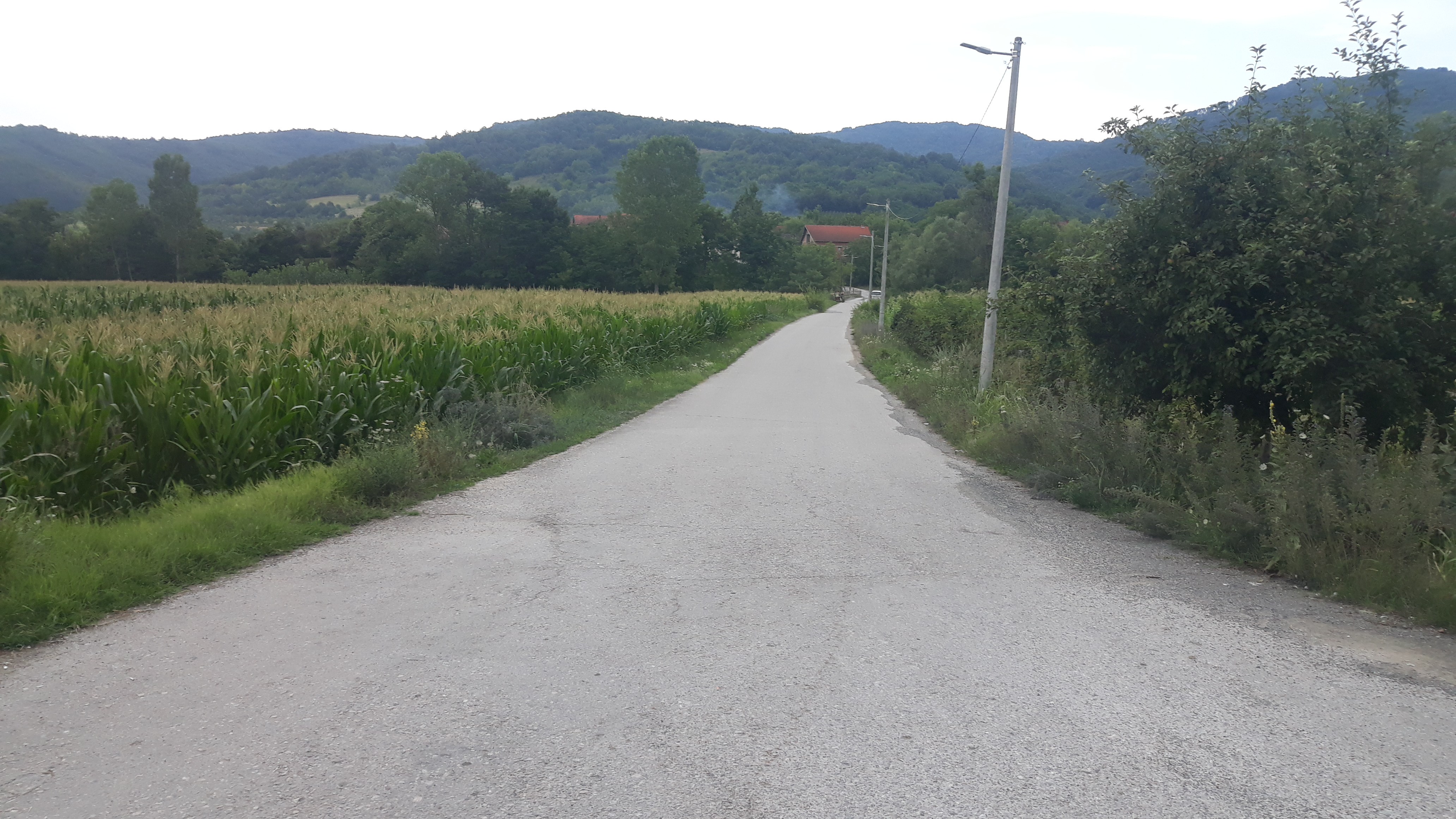 Скретање за Сувају са главног пута Крушевац - Брус.